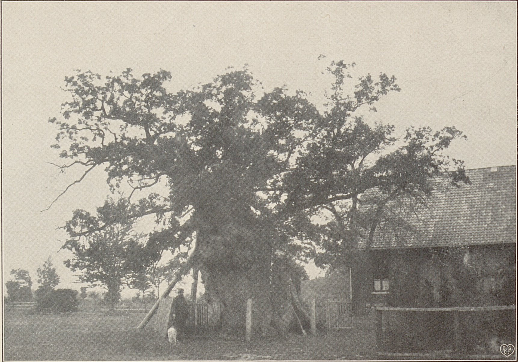 Femeiche bei Erle um 1900